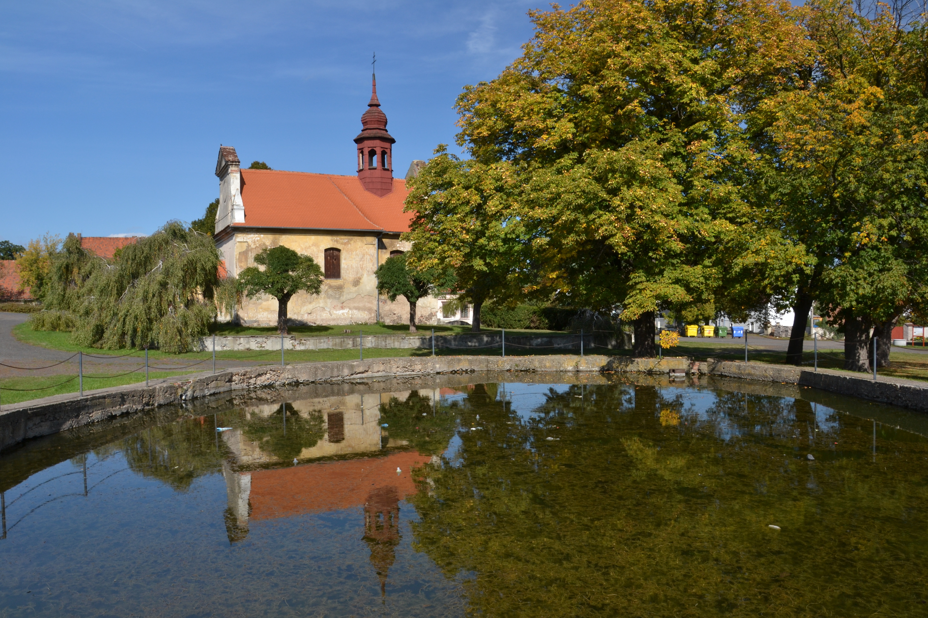 Kostel sv. Markéty (Vintířov), Vintířov